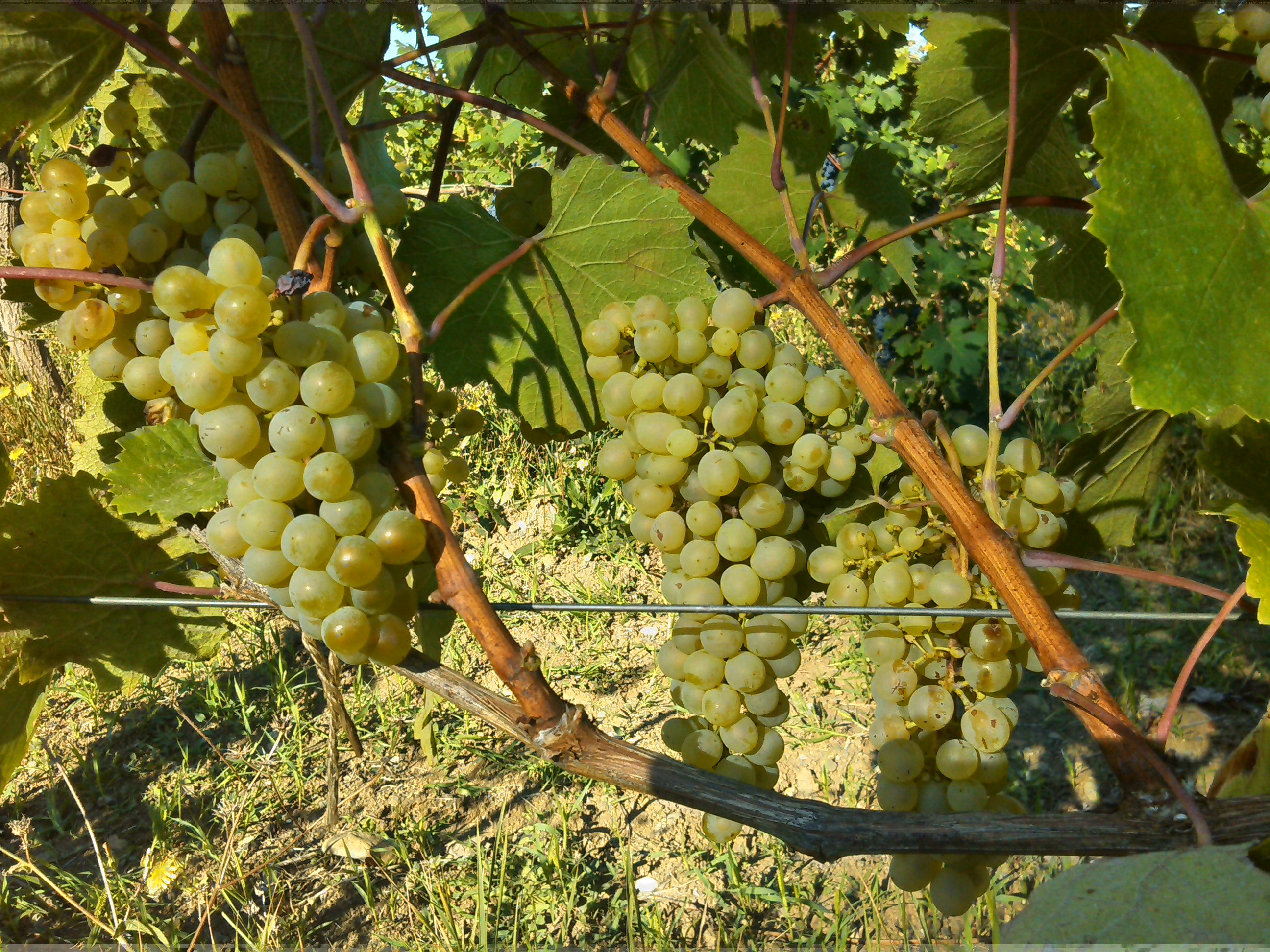 იშვიათი ვაზის ჯიში